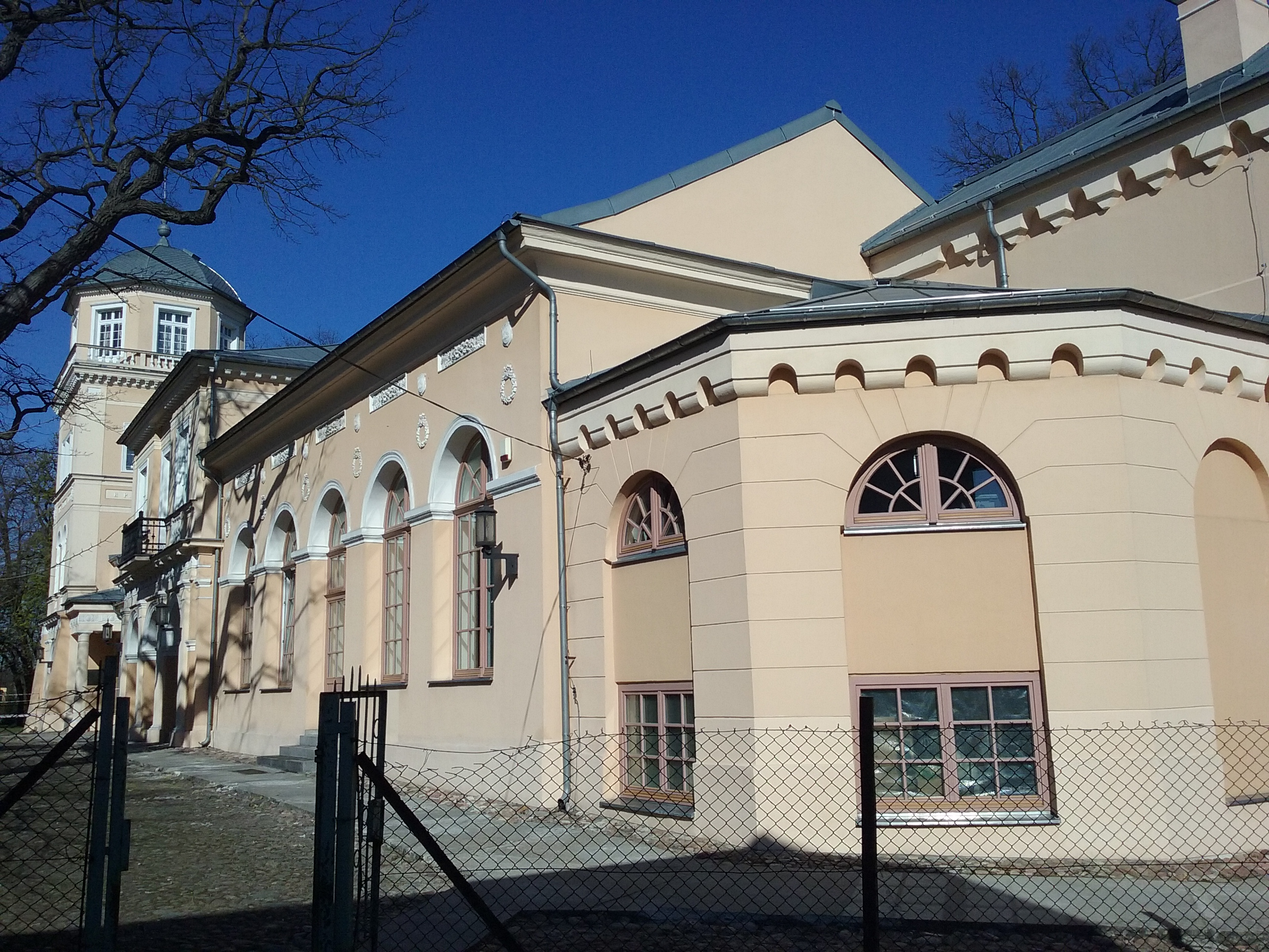 Tomaszów Mazowiecki w województwie łódzkim, PL, EU. Pałac Ostrowskich widok od strony południowo-wschodniej. CC0